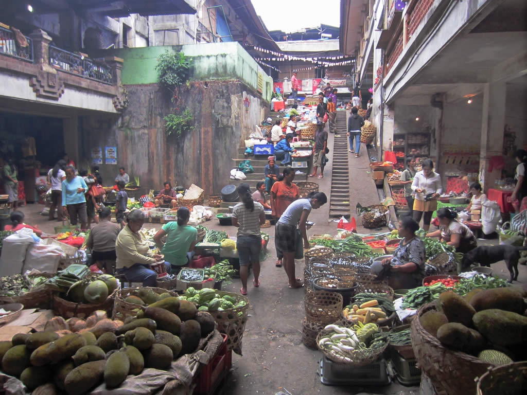 Vegetable Market, Ubud, Bali